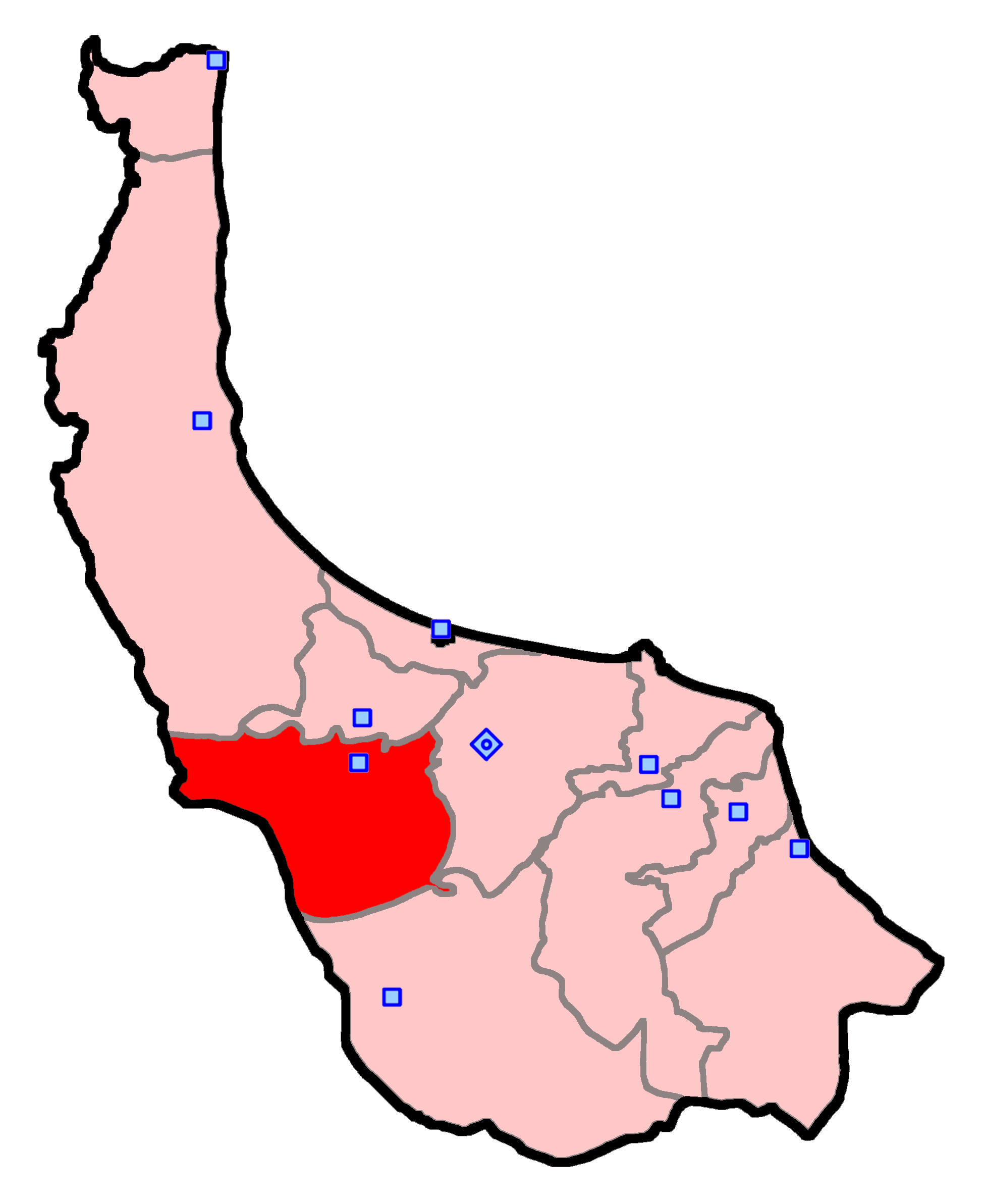 فومن و شفت برای انتخابات مجلس شورای اسلامی